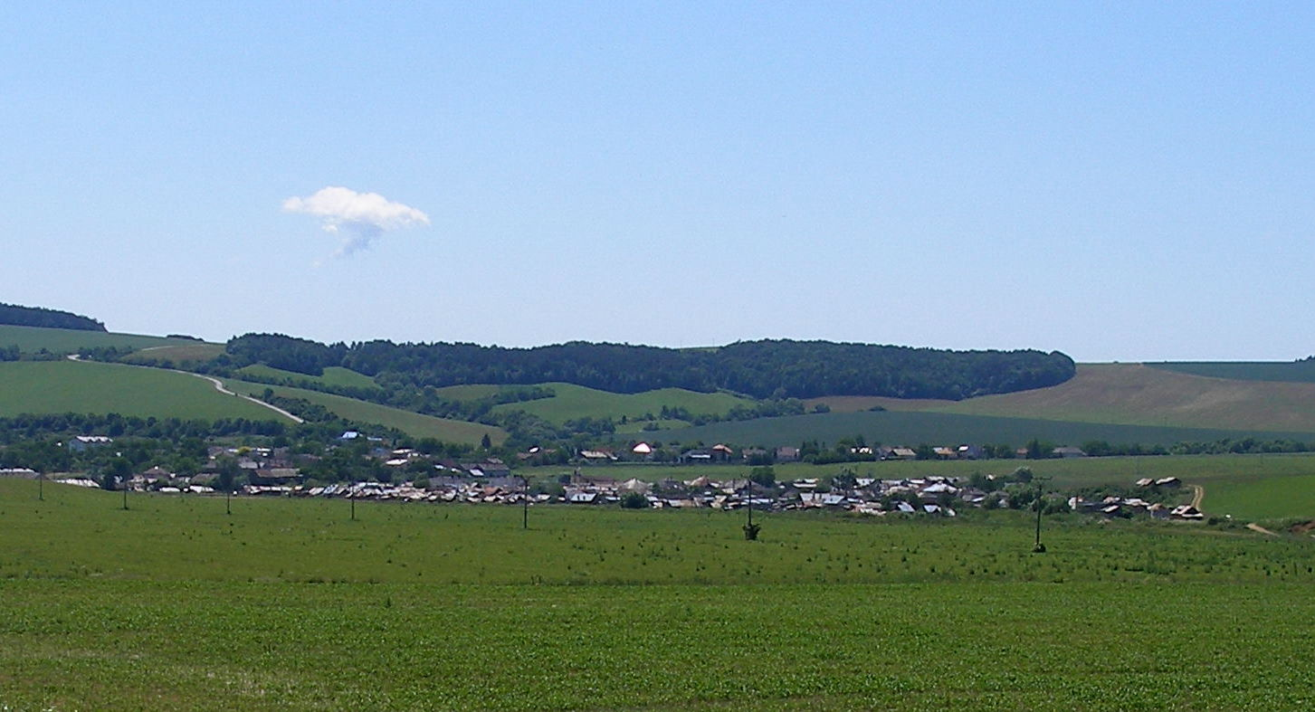 Obec Jarovnice okres Sabinov, rómska osada Močidľany